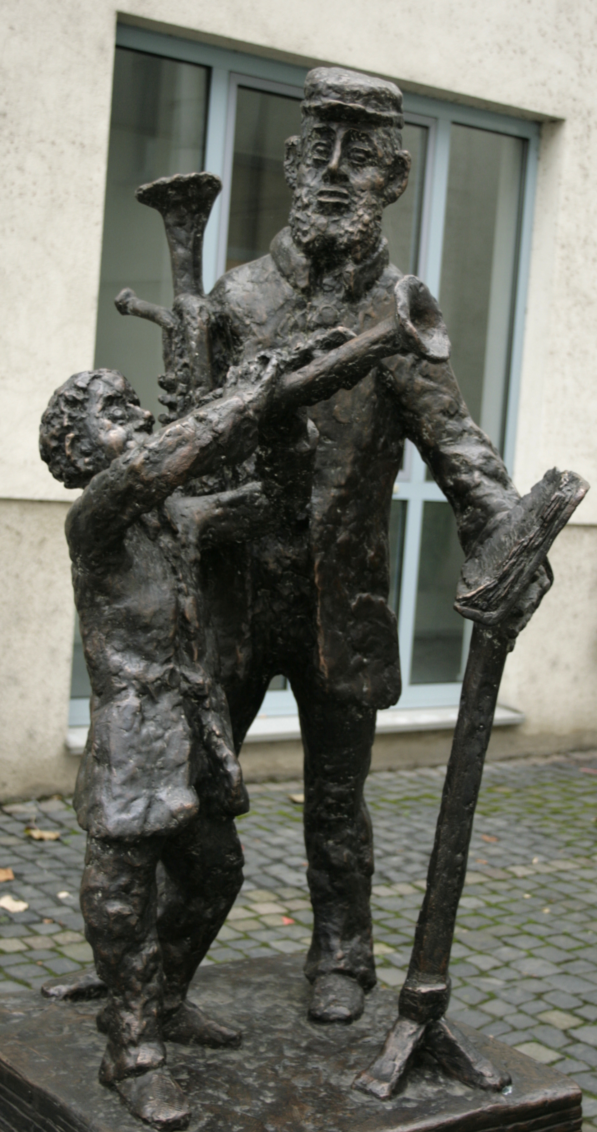 Skulptur "Musikantenblut" in Elz, Deutschland